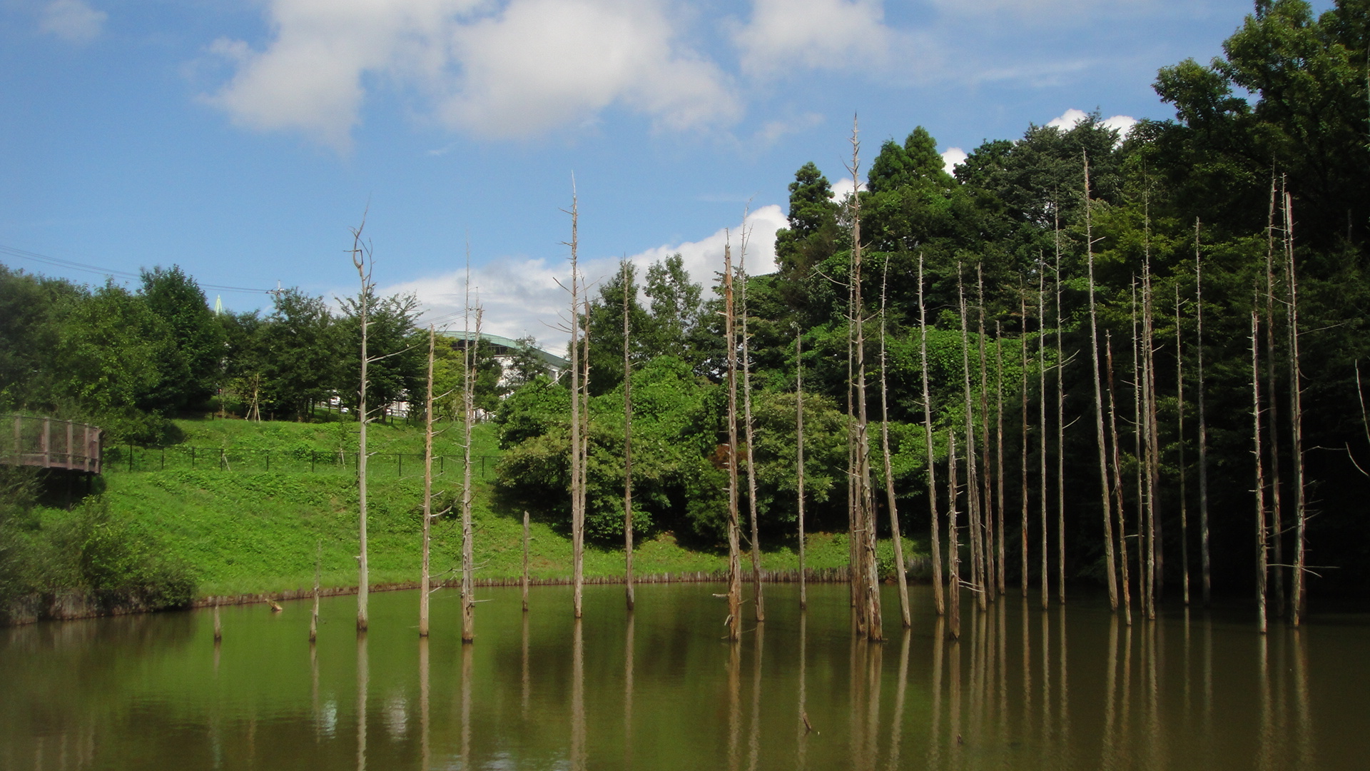 小山内裏公園内にある太田川の水源である大田切池